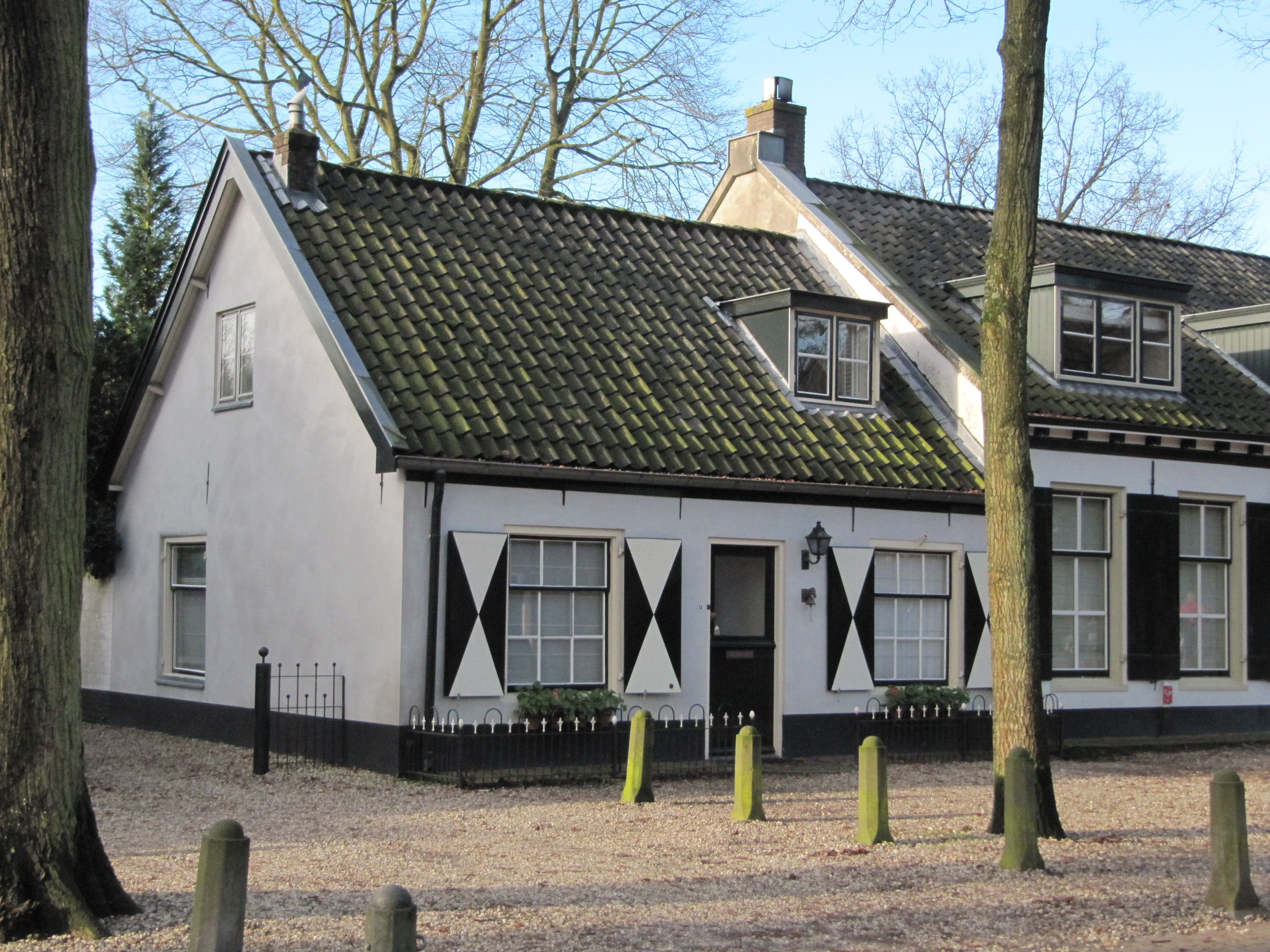 RM8553 Lage Vuursche.jpg